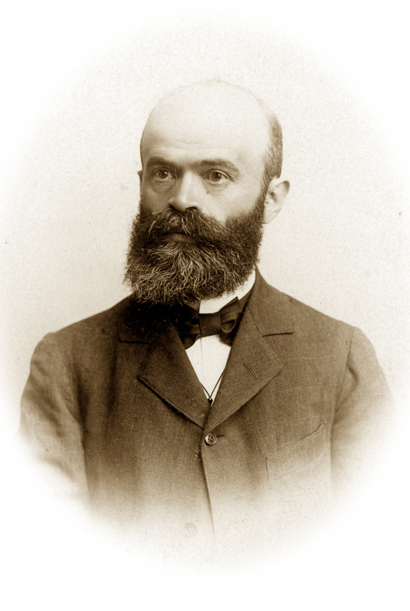 Миха́йло Іва́нович Павли́к (17 вересня 1853, Монастирське — 26 січня 1915, Львів) — український письменник, публіцист, громадський і політичний діяч. Дійсний член НТШ. Разом з Іваном Франком у 1890 р. створили Русько-українську радикальну партію (РУРП).